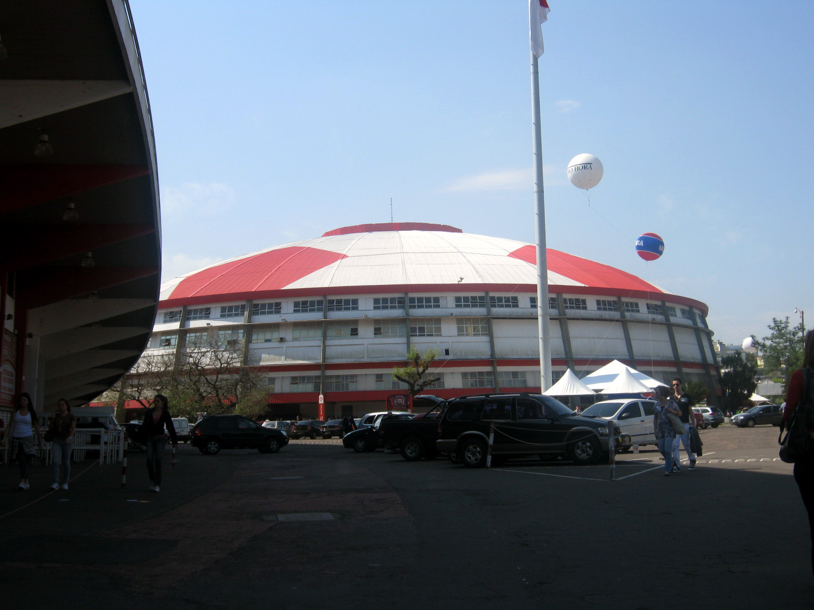 SPORT CLUB INTERNACIONAL Arena (Gigantinho)